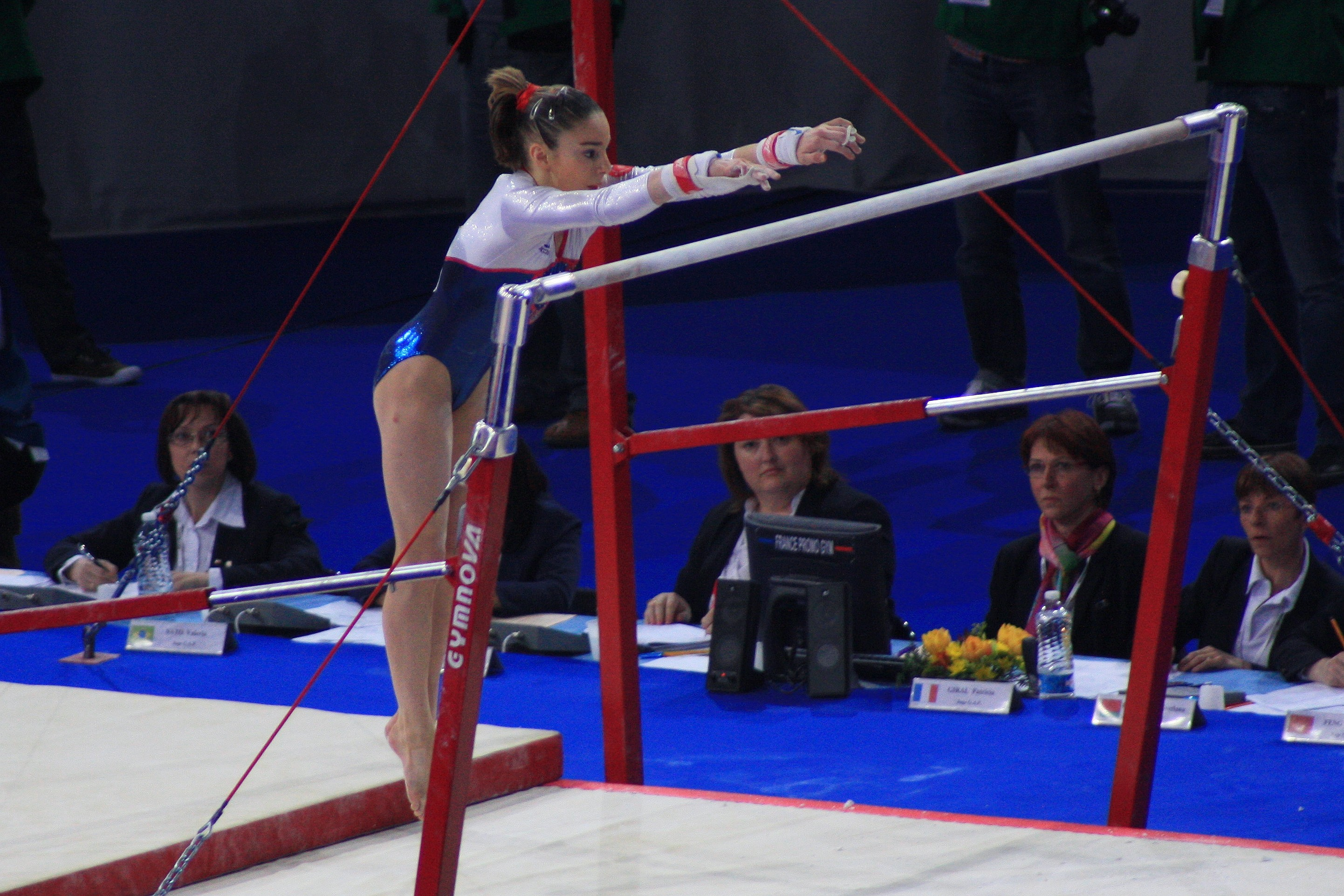 Youna Dufournet fait son entrée en barres asymétriques, en qualification des 17e Internationaux de France, en 2010.